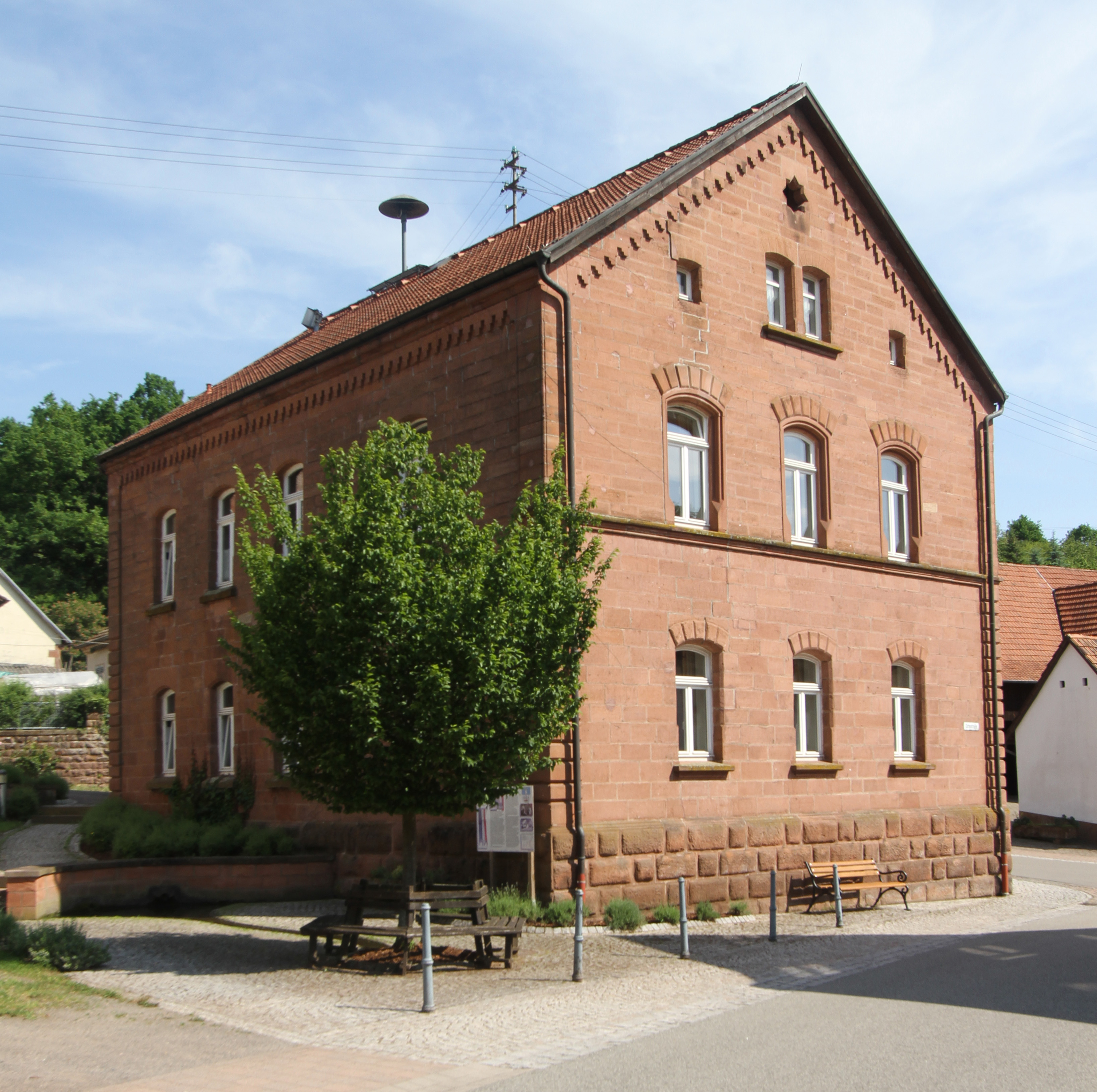 Denkmalgeschütztes Haus in Rumbach.